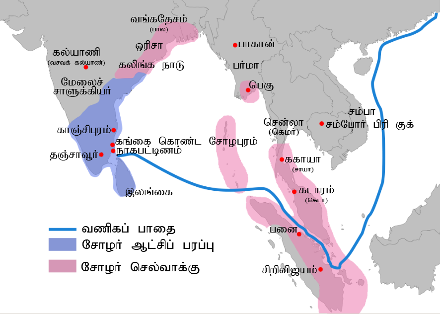 சோழப் பேரரசு வரைபடம்